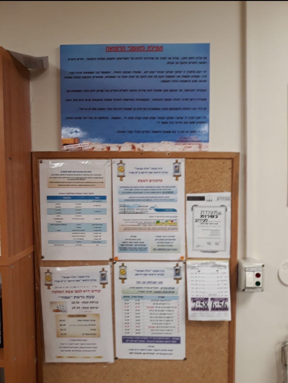 "תפילת תומכי הרפואה"